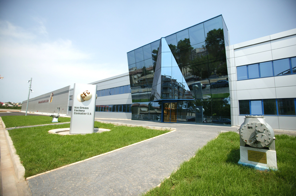 Fachada de la empresa Ice Cream Factory